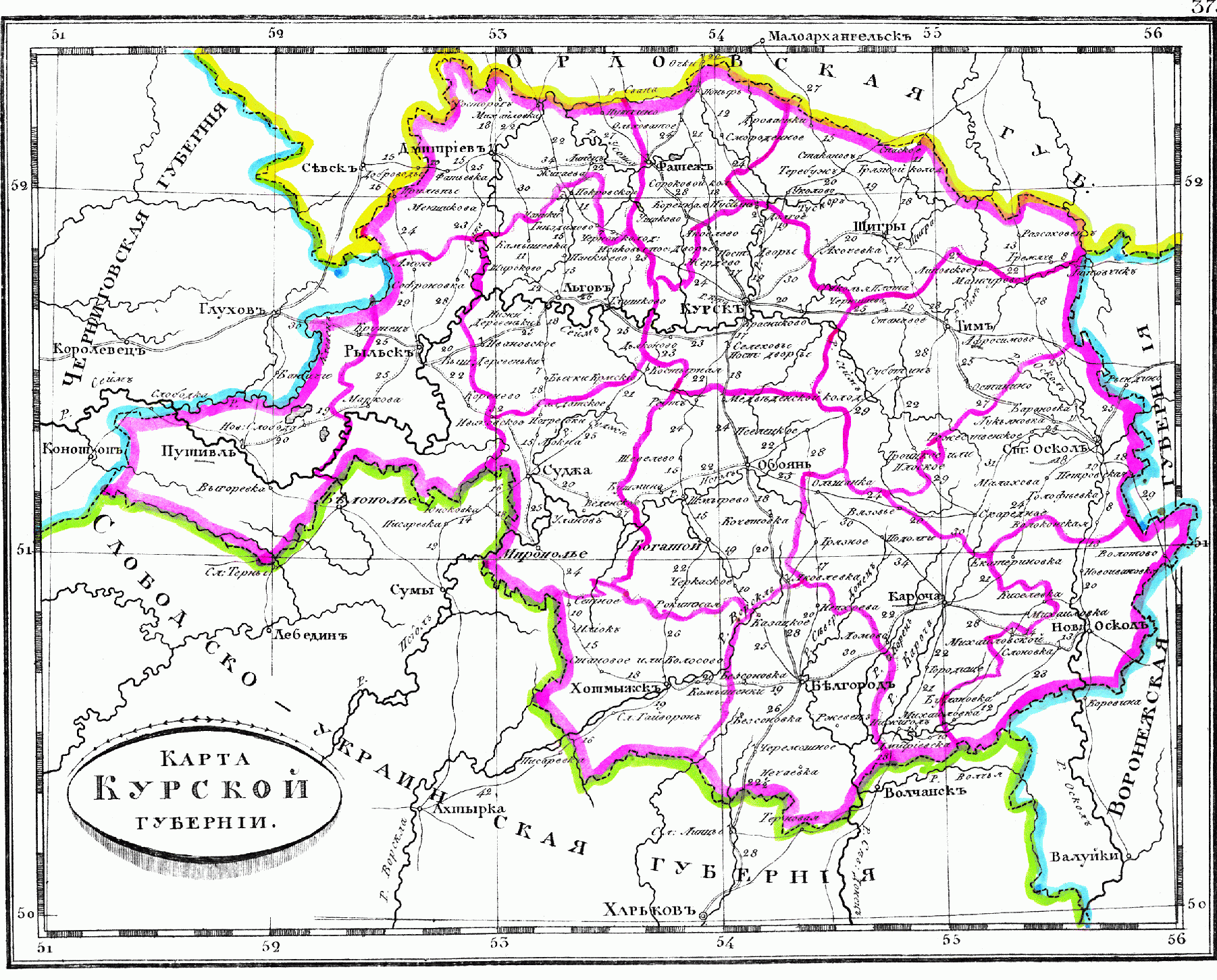 Карта Курской губернии, 1835